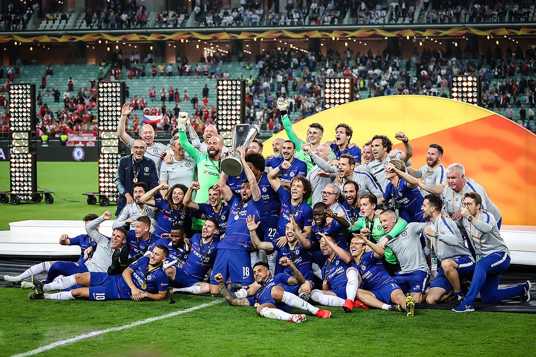 مسابقه چلسی و آرسنال، فینال لیگ اروپا ۲۰۱۹